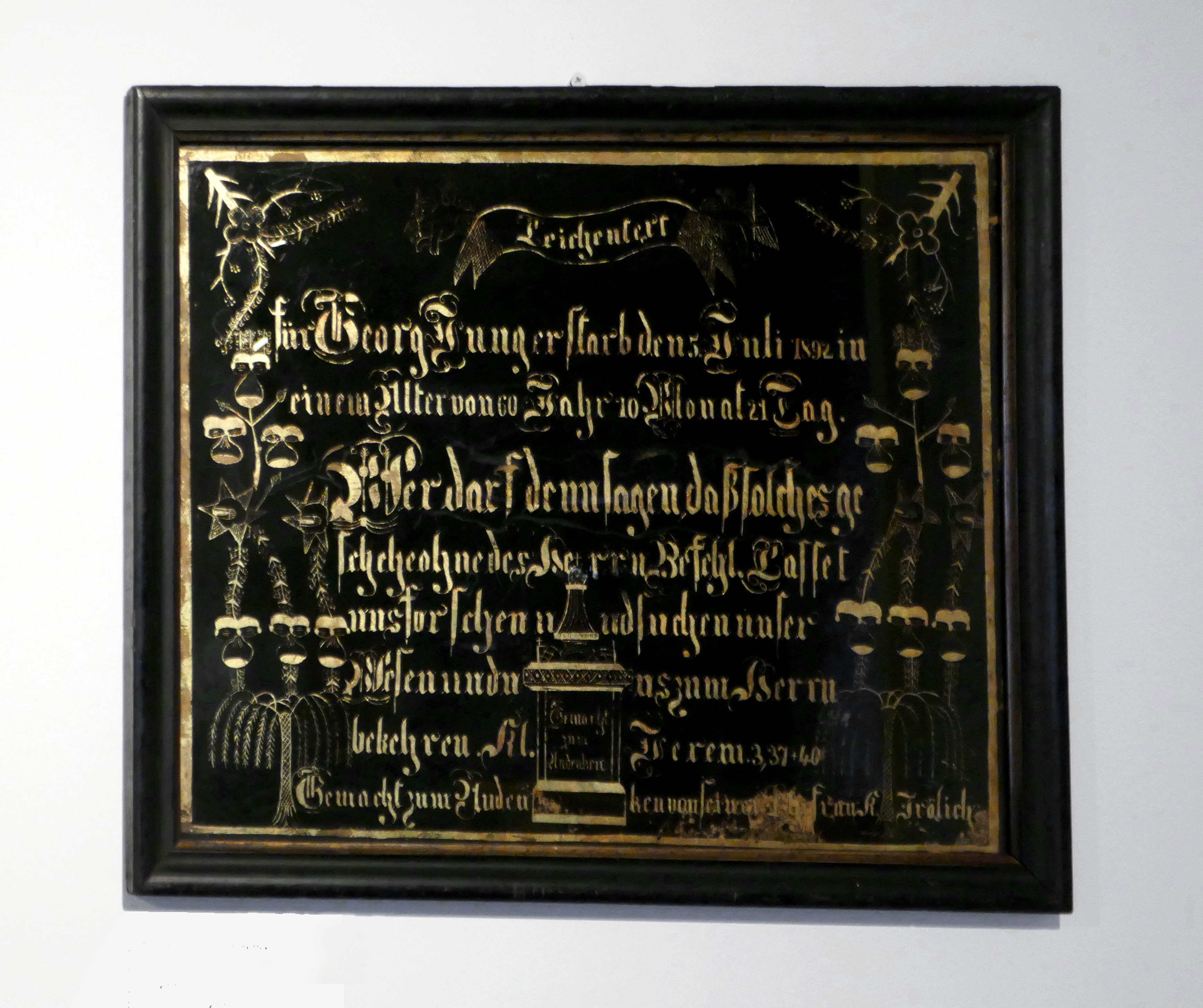 Souvenir mortuaire (Leichentext) églomisé offert par sa femme pour Georges Jung décédé en 1892. Le décompte des années, mois et jours de sa vie est noté avec précision. Exposition Vies protestantes : le mot et l'image au Musée alsacien de Strasbourg (2017)